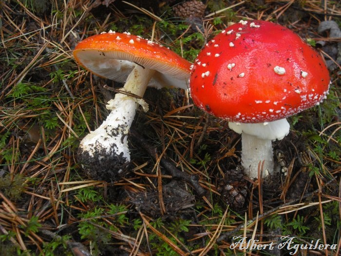 Bolet Amanita muscaria